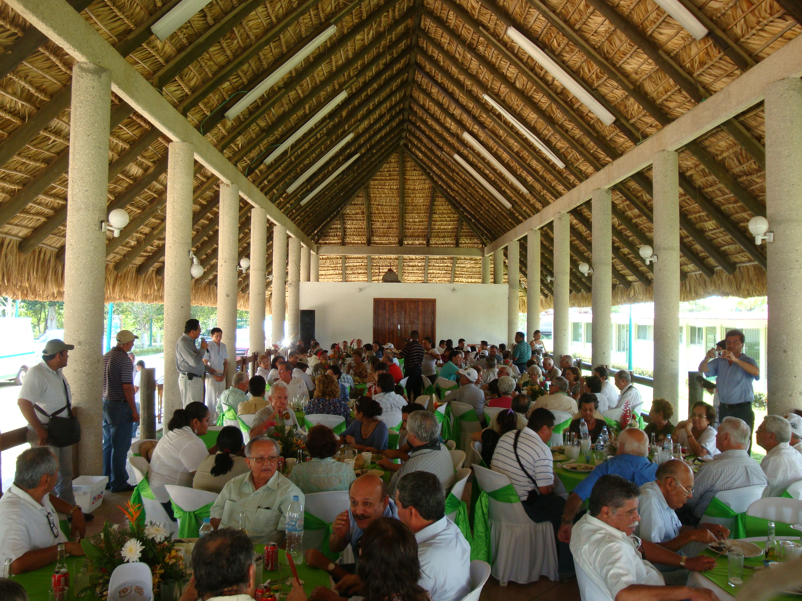 Instalaciones para eventos y grupos en la estación Tres Brazos. Reserva de la Biosfera "Pantanos de Centla", municipio de Centla, Tabasco, México.